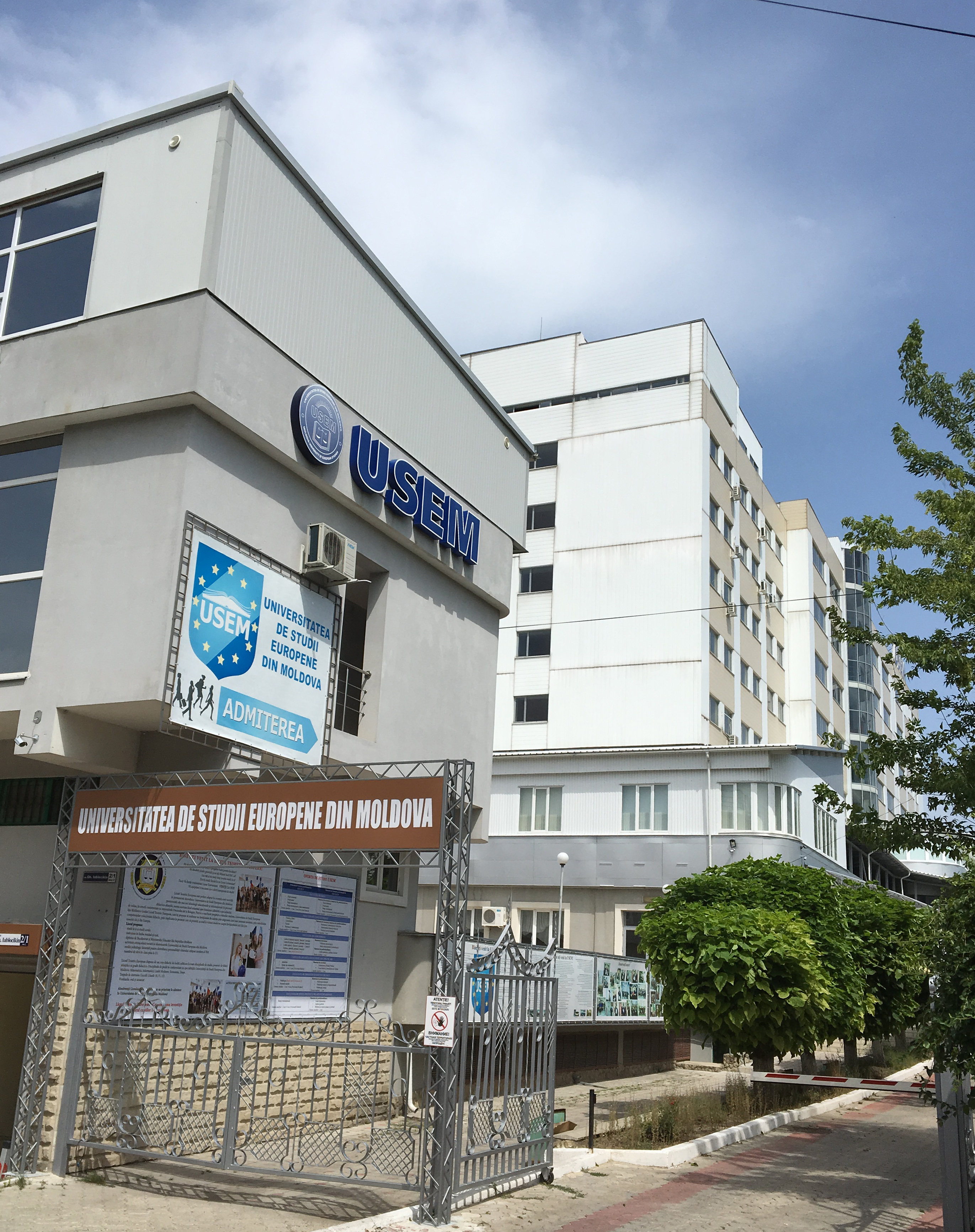 Portile - Intrare pe teritoriul USEM